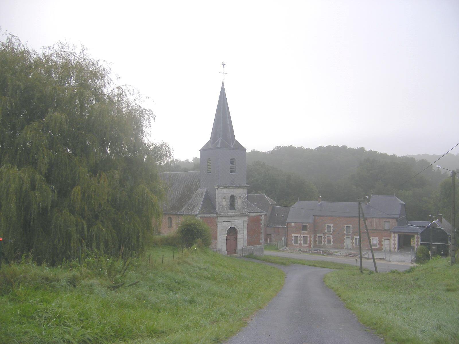 La Férée